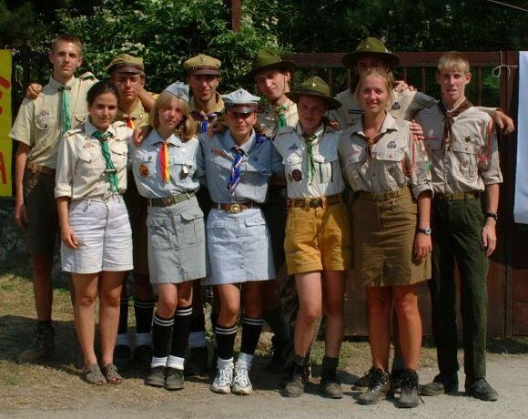 Magyar, lengyel, szlovák és cseh cserkészek a Carpathia 2001-en, a Magyarországon, Csobánkán rendezett Közép-Európai Dzsemborin